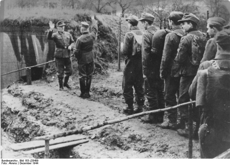 Zentralbild / II. Weltkrieg 1939-45. Einsatz des Volkssturmes im Moselland, Dezember 1944. Eine Gruppe Volkssturmmänner trifft an dem getarnten Bunker ein, dessen Verteidigung sie übernehmen sollen. Aufnahme: [Herbert] Ahrens [Scherl Bilderdienst]